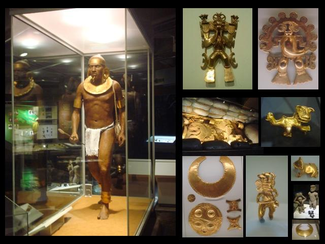 Collage con objetos representativos que se encuentran en el Museo del Oro Precolombino de San José de Costa Rica.